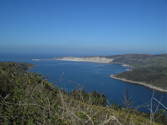 Entrada da Ría de Ferrol, Galicia, Spain.